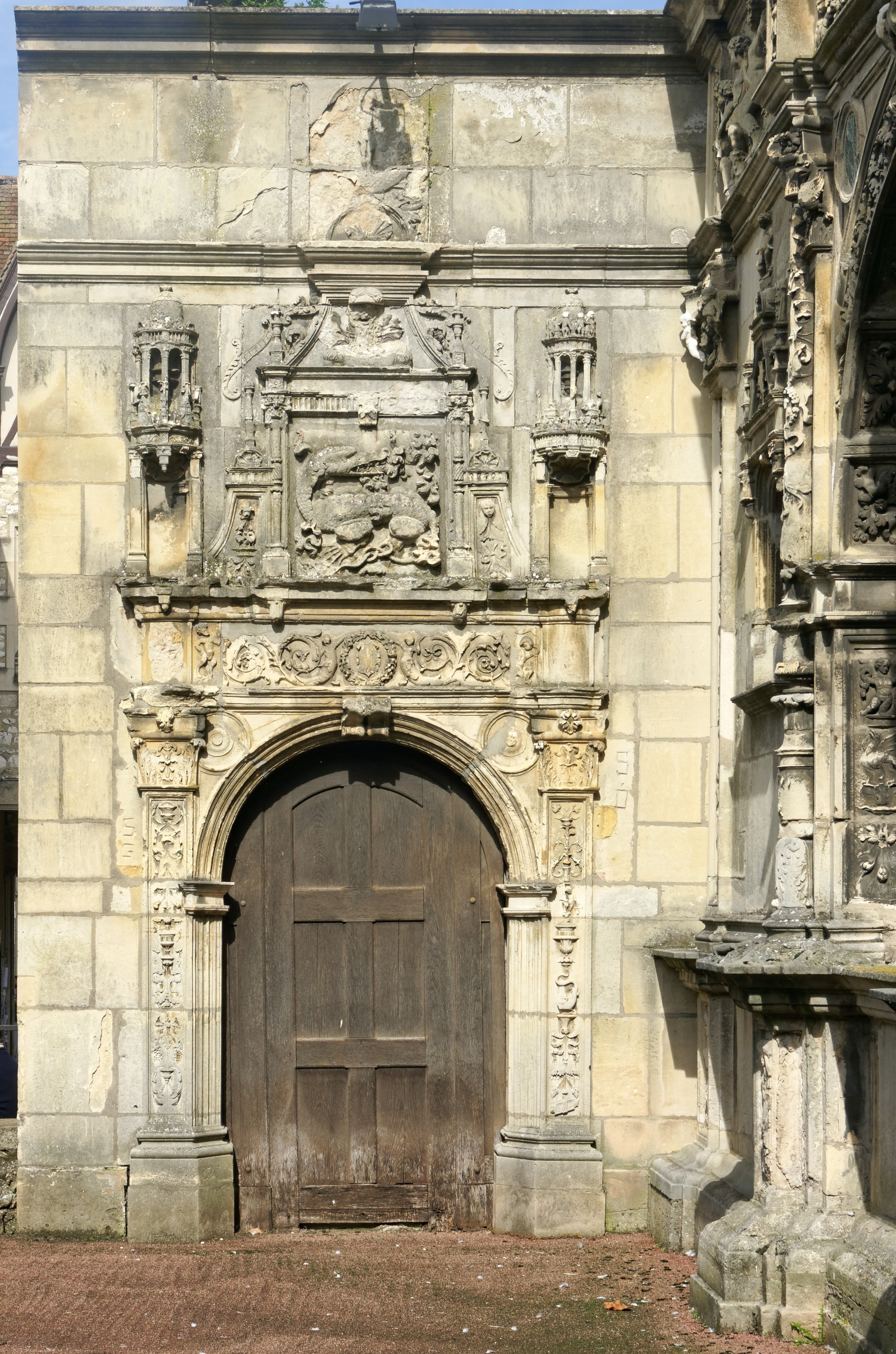 Maison dite de François Ier (Hôtel de Chabouillé), dans la cour de l'Hôtel de ville à Moret-sur-Loing